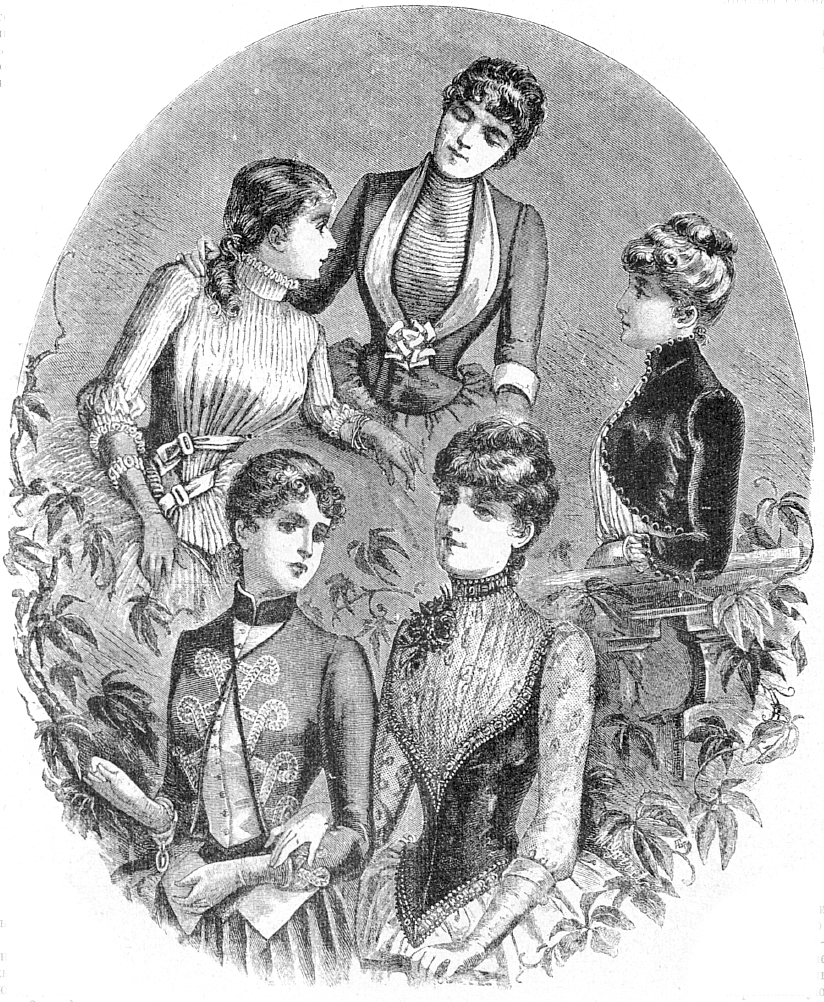 Иллюстрация в журнале "Вестник моды" (1885. №40): 1. Атласный корсаж 2. Кисейная блуза 3. Бархатное фигаро 4. Суконный жакет 5. Корсаж из бархата и тюля.